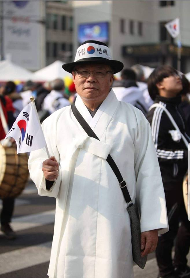 2017년 3월 1일 3.1절 행사 당시 서울시의회 앞에서 찍은 백은종대표의 모습